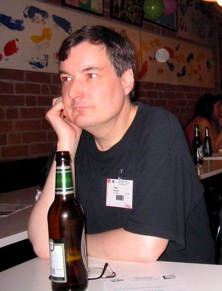 Yves Bellefeuille dum IS en Wetzlar 2005. Bellefeuille estas foje ŝerce alinomita "Jolies oreilles" (elparolata [ĵolizorej'], laŭ fonetika franca skribo Joli-z-oreil) ĉar "feuille" (folio) estas slange uzata por nomi orelojn ("oreilles") kaj "jolie" (beleta) simple estas vorto preskaŭ samsignifa kiel "belle" (bela). De tie venas la nomo de la dosiero kun piĝina skribmaniero de la francaj vortoj. Cetere, en franca piĝino parolata en insulo Reunio la francoj elvenantaj el metropola teritorio estas nomataj "zoreilles" verŝajne pro sia emo tuŝi sian orelon por geste esprimi ke ili ne komprenas piĝinparolantojn. Persona foto de sub GFDL.